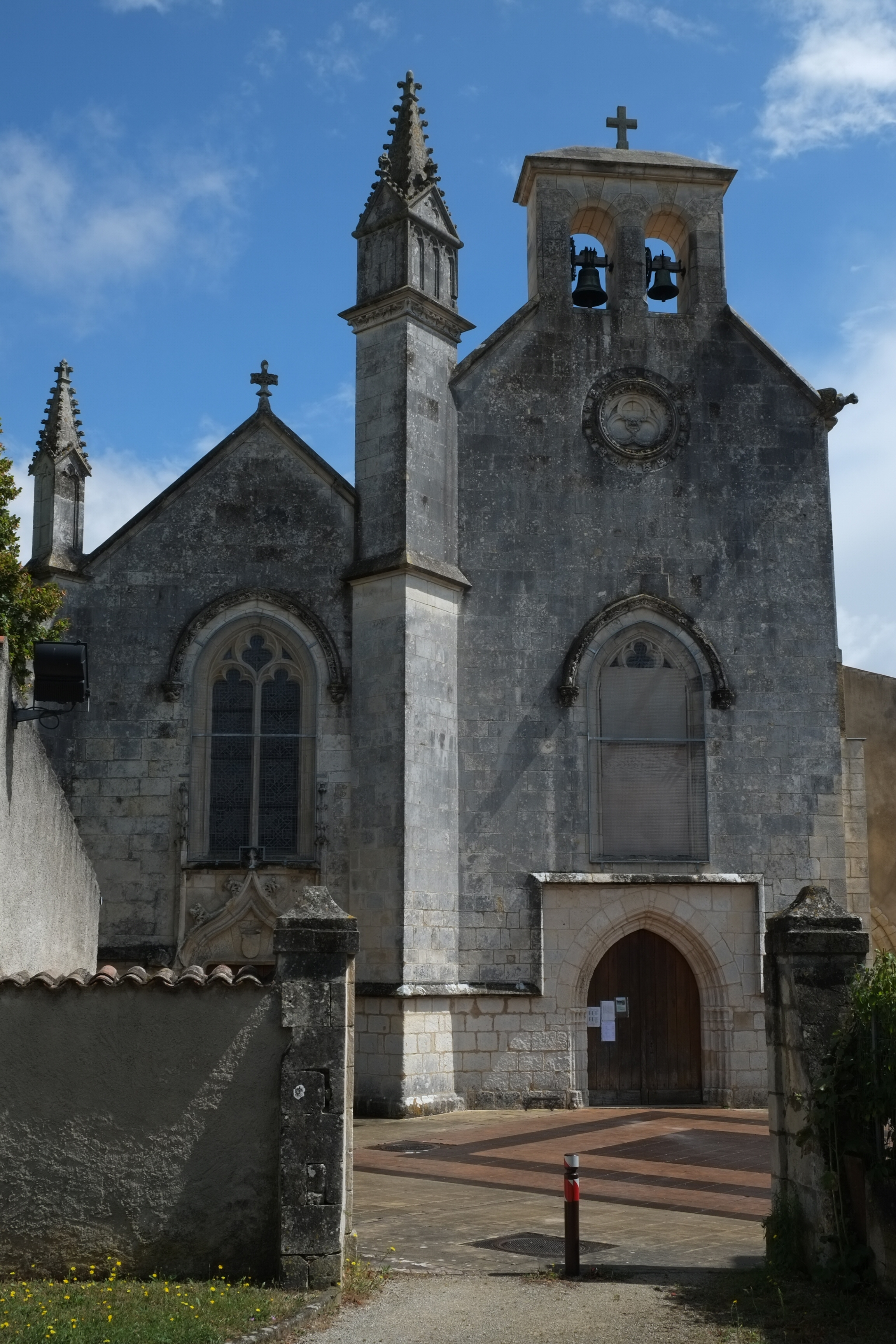 Eglise Saint-Cybard Périgny Charente-Maritime France